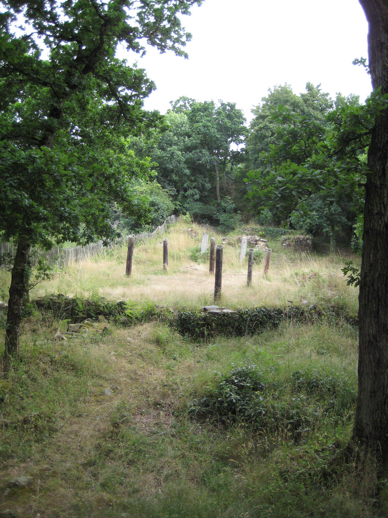 Château d'Olivet à Grimbosq (Calvados, France) : vestige de l'habitat seigneurial et de la motte castrale (en arrière-plan)